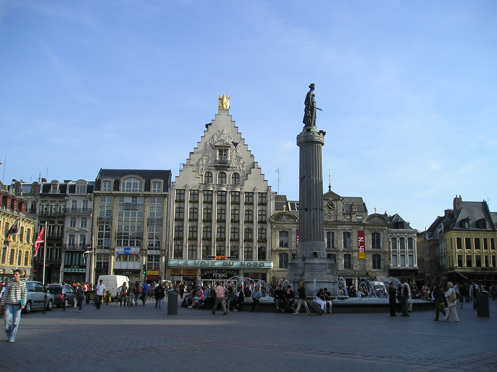 LILLE : Grand Place